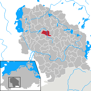 Bülow in Mecklenburg-Vorpommern - District Parchim